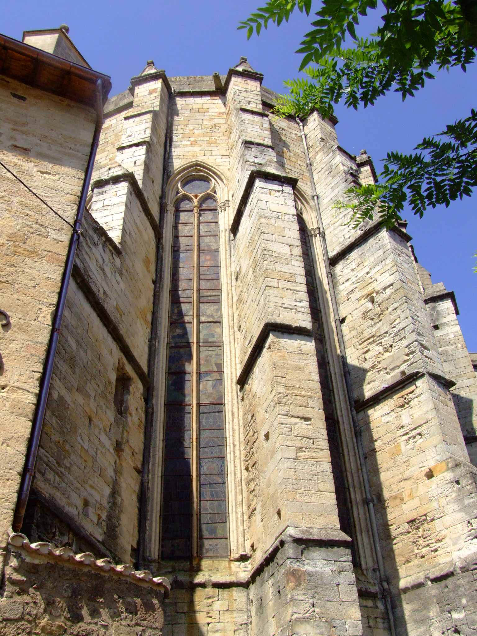 Lodève is a commune of the Hérault département - France. Cathédrale Saint-Fulcran de Lodève Buttresses at the apse. - Google Maps - Google Earth